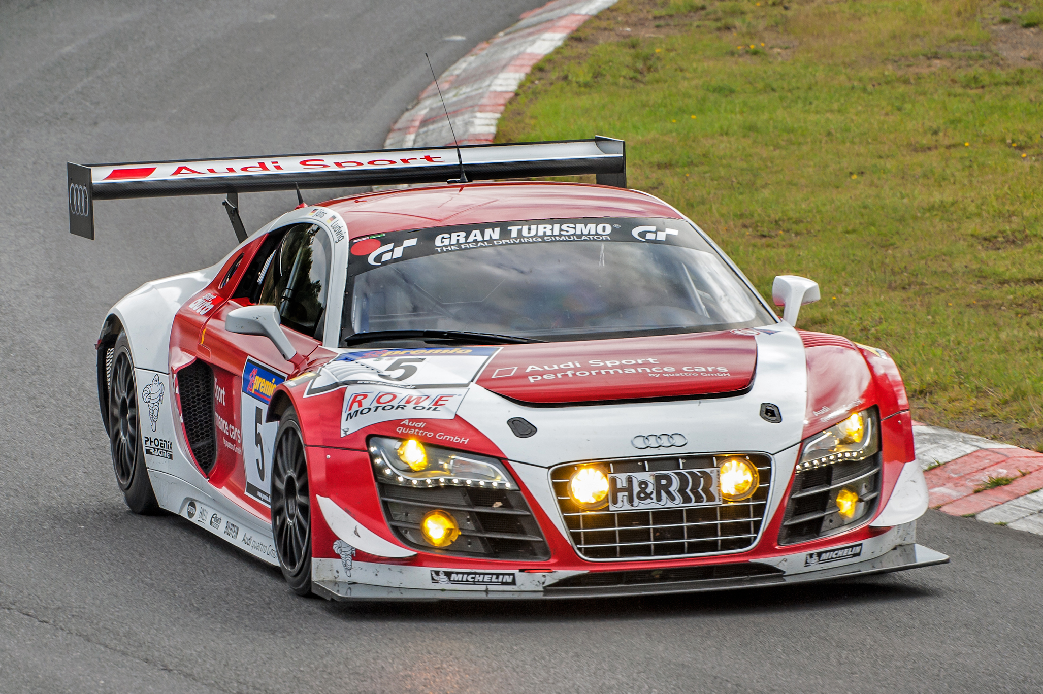 Audi R8LMS beim 9. Lauf der VLN-Serie auf dem Nürburgring.